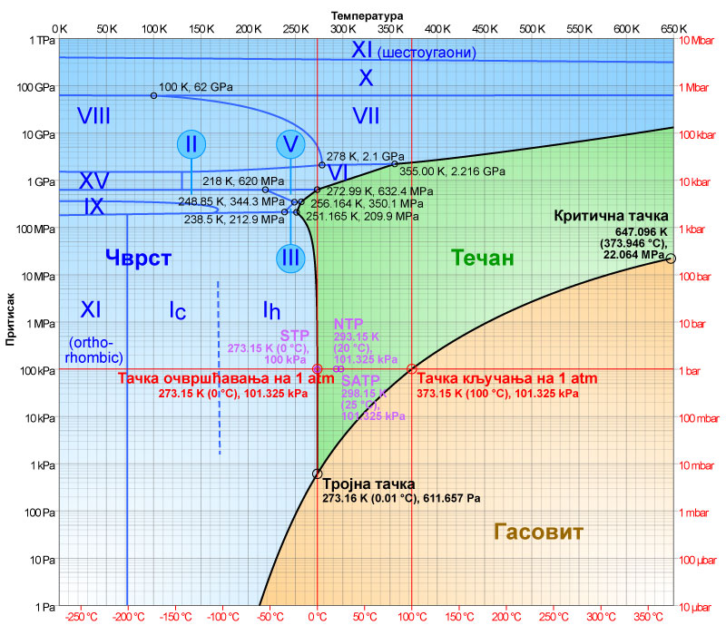 Српски (ћирилица): Фазни дијаграм воде